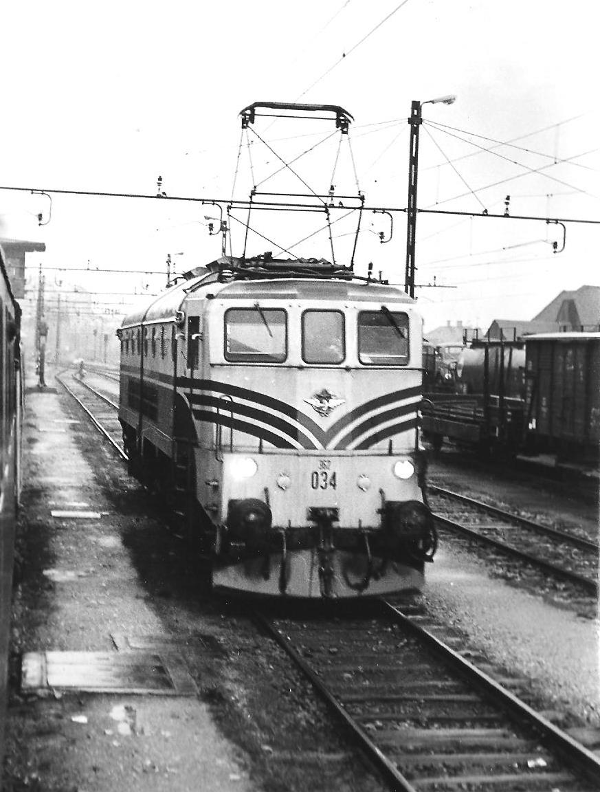 Elektrische Lokomotive der JZ BR 362-034